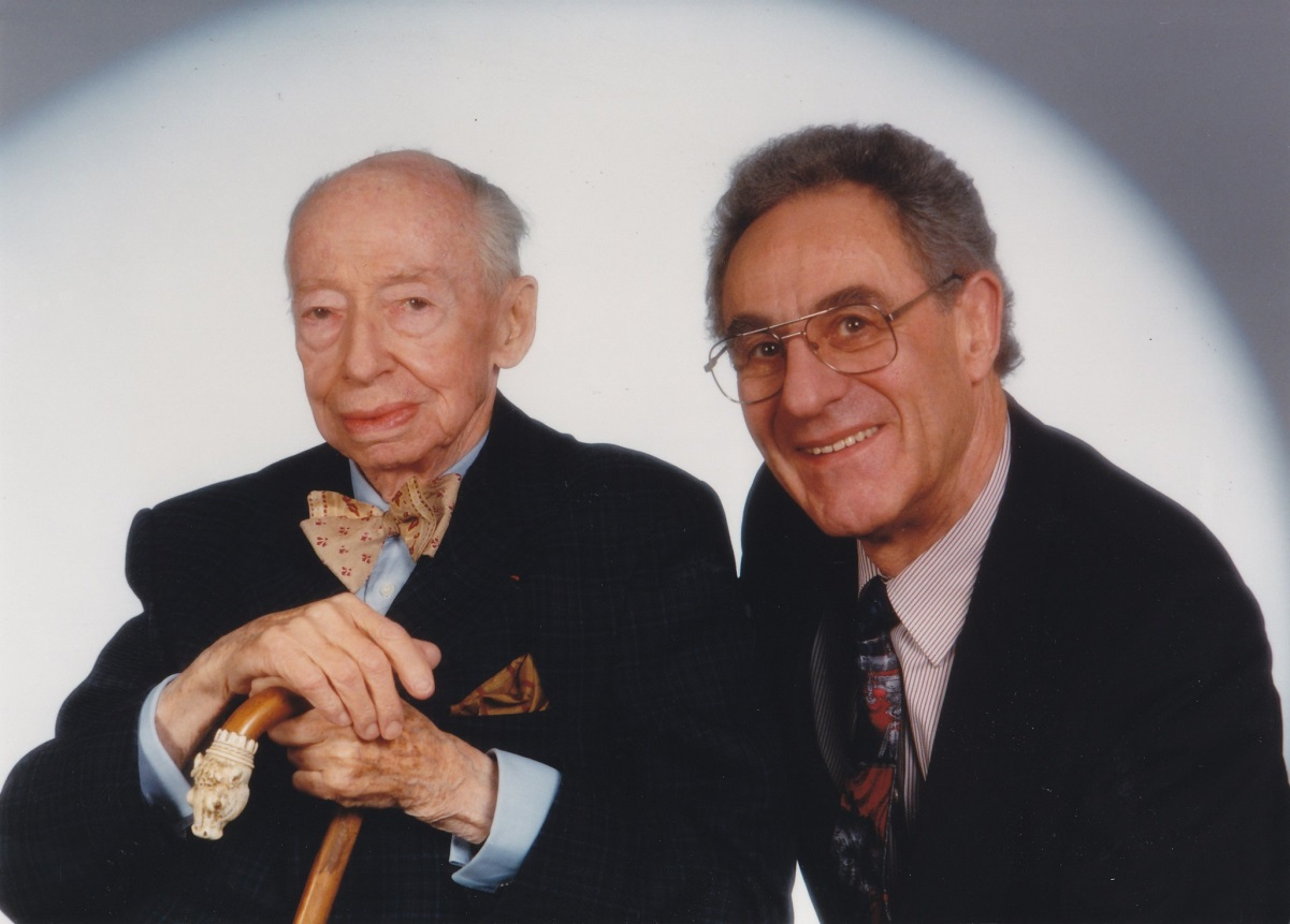 FIDUKA (1997) - links André Kostolany, rechts Gottfried Heller (Foto: Bennys Buidl Fabrik)